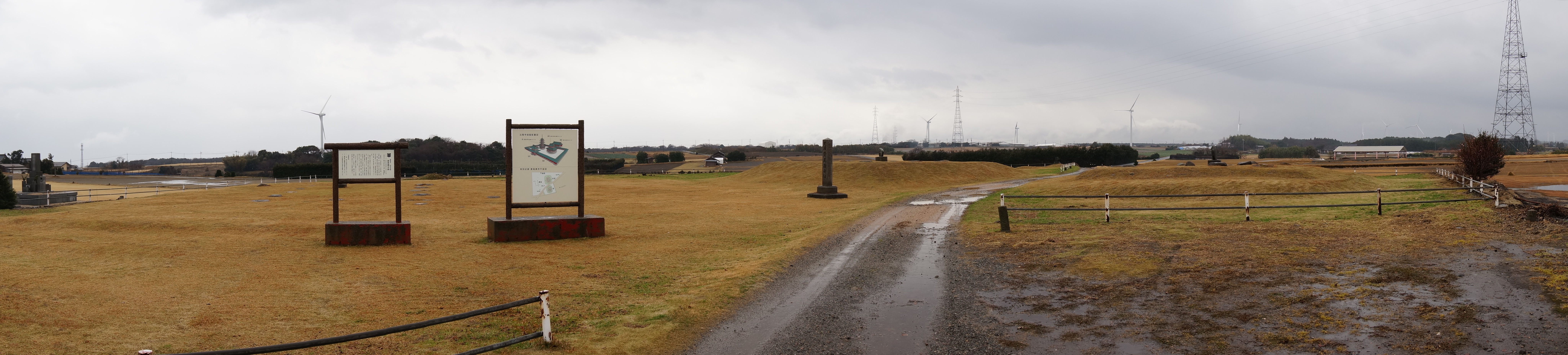 斎尾廃寺跡（鳥取県東伯郡琴浦町）